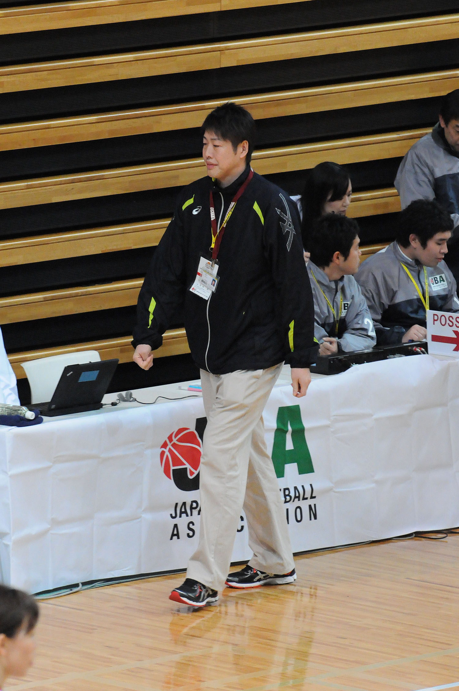 秋田銀行、古田悟HC。大田区総合体育館で。